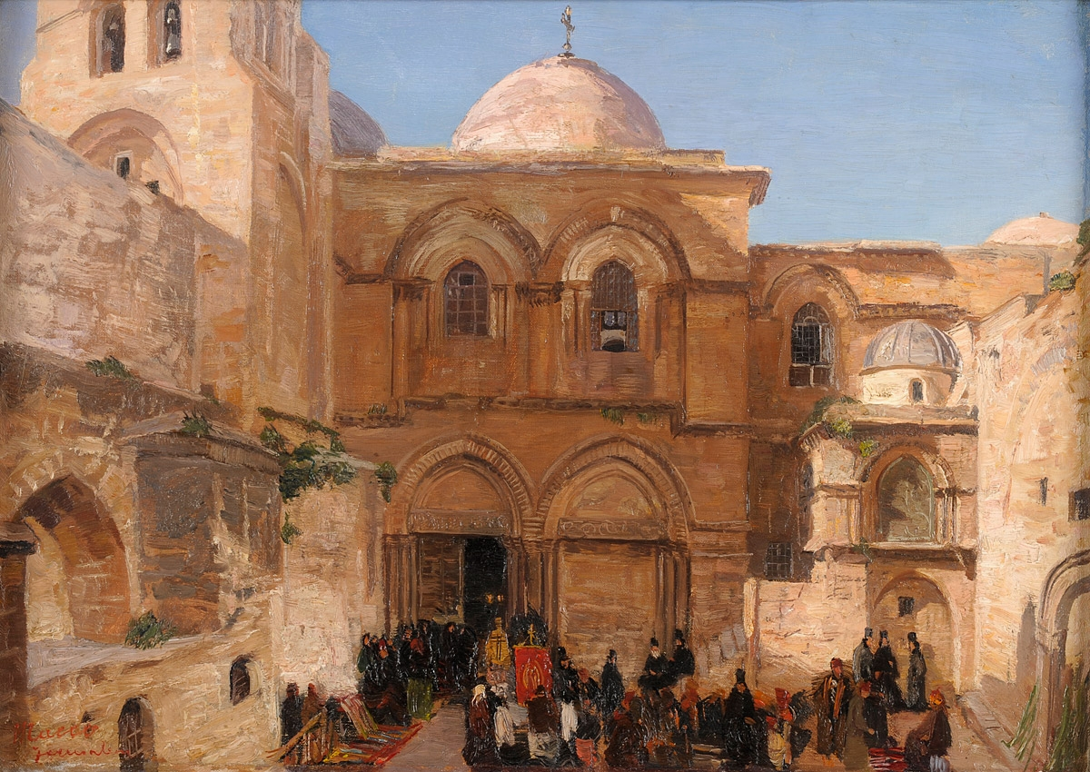 Die Grabeskirche zu Jerusalem. Signiert. Öl/Lwd., 34 x 47,5 cm